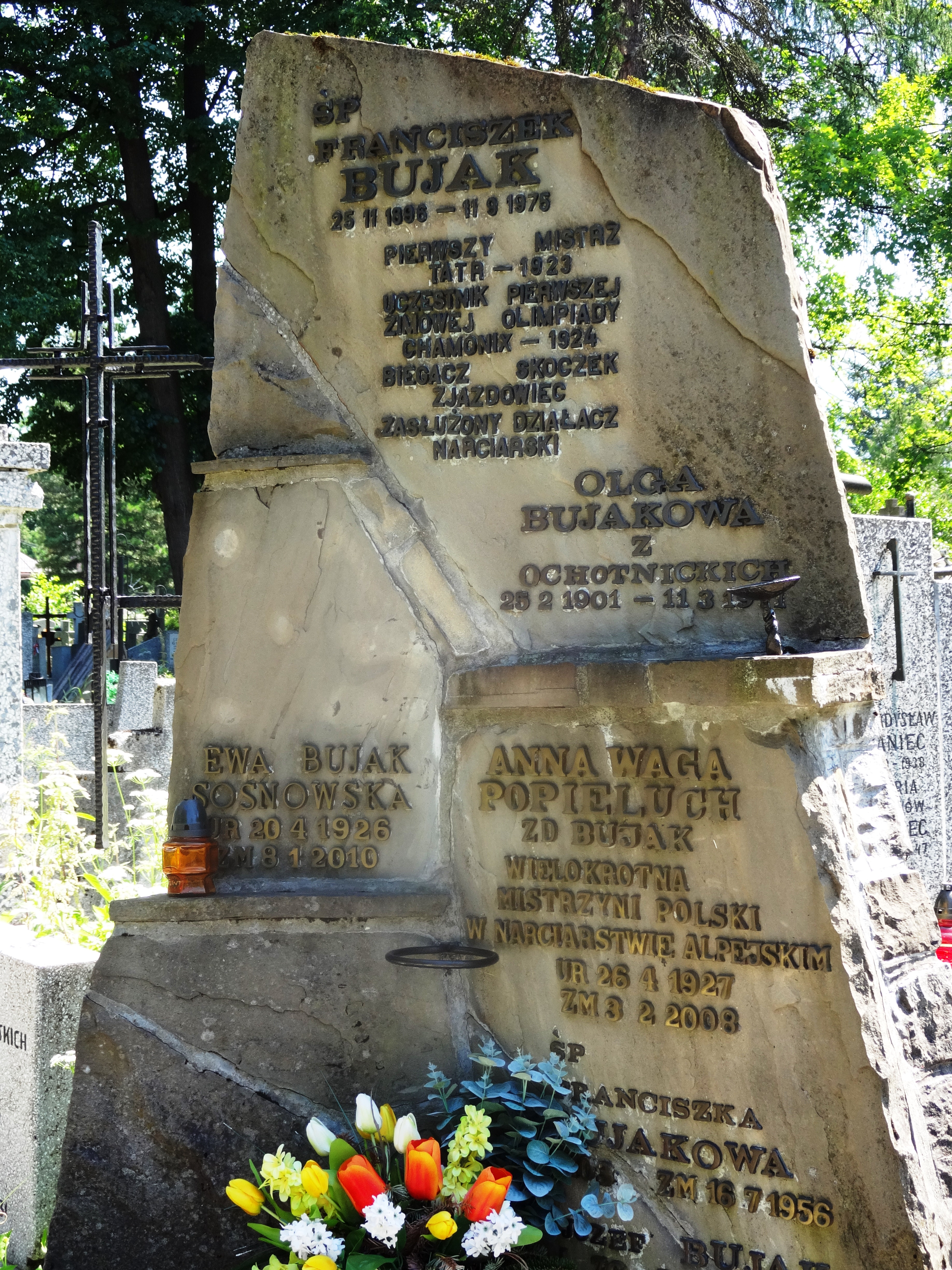 New Cemetery in Zakopane